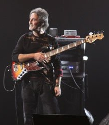 Fabio Pignatelli